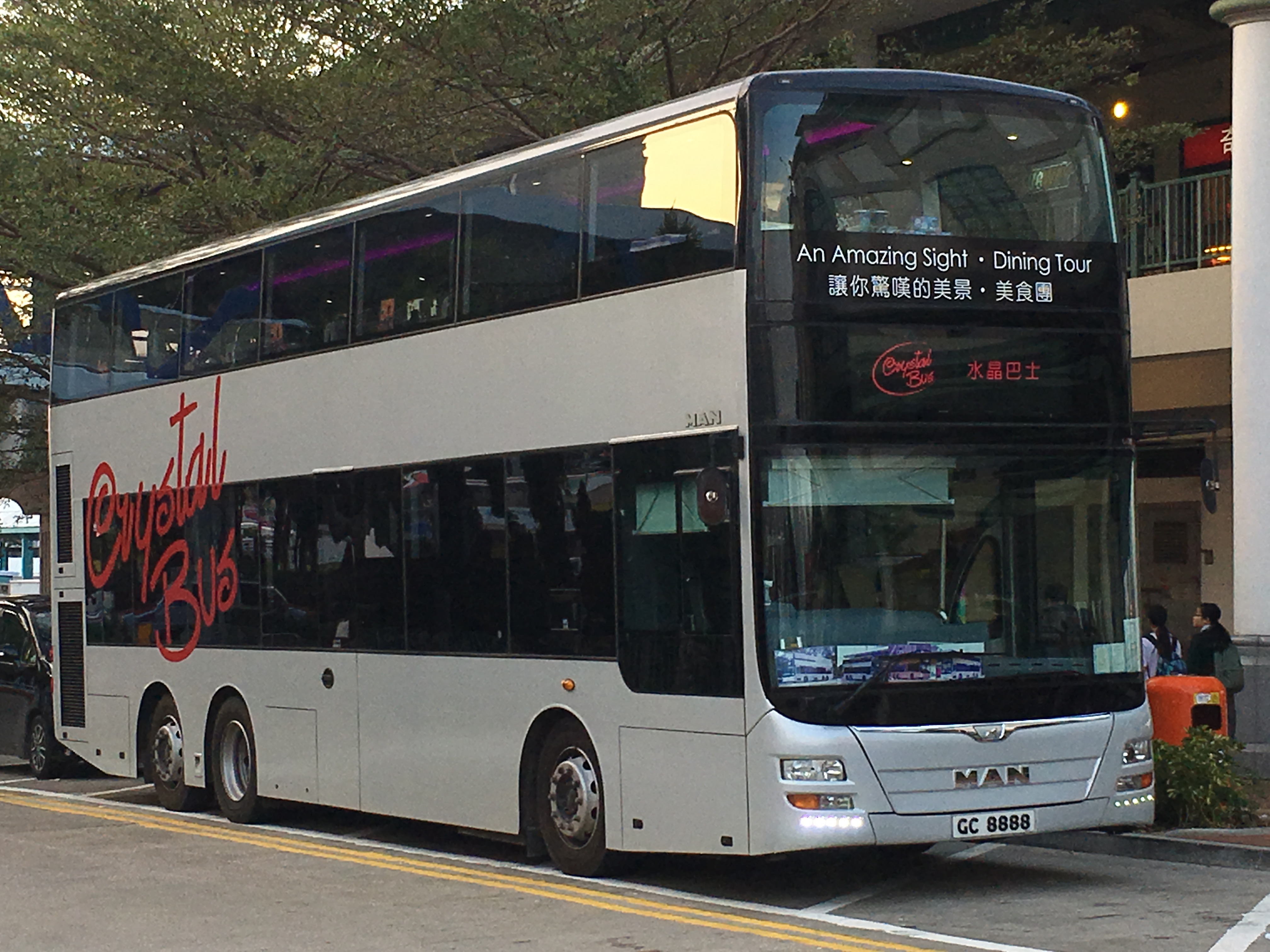 This photo is taken in Central Pier.